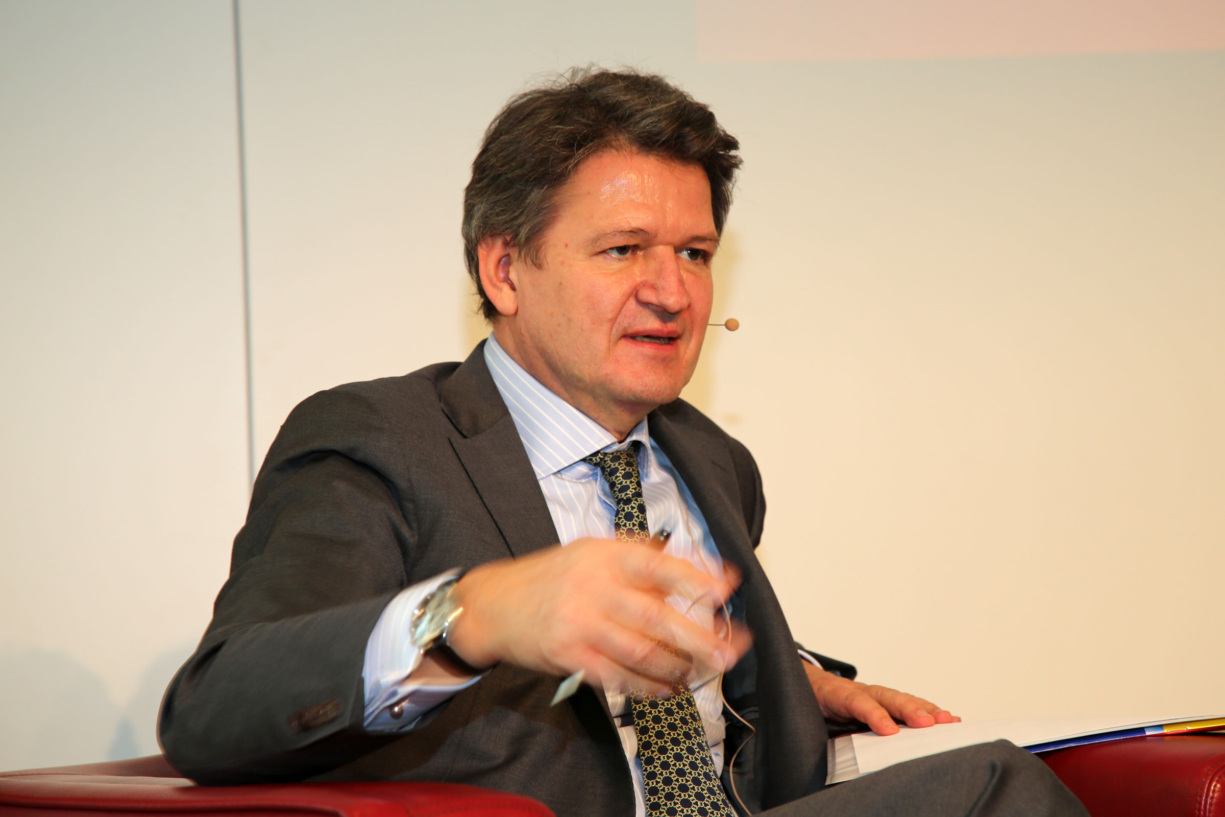 Brandstätter_Helmut-9625